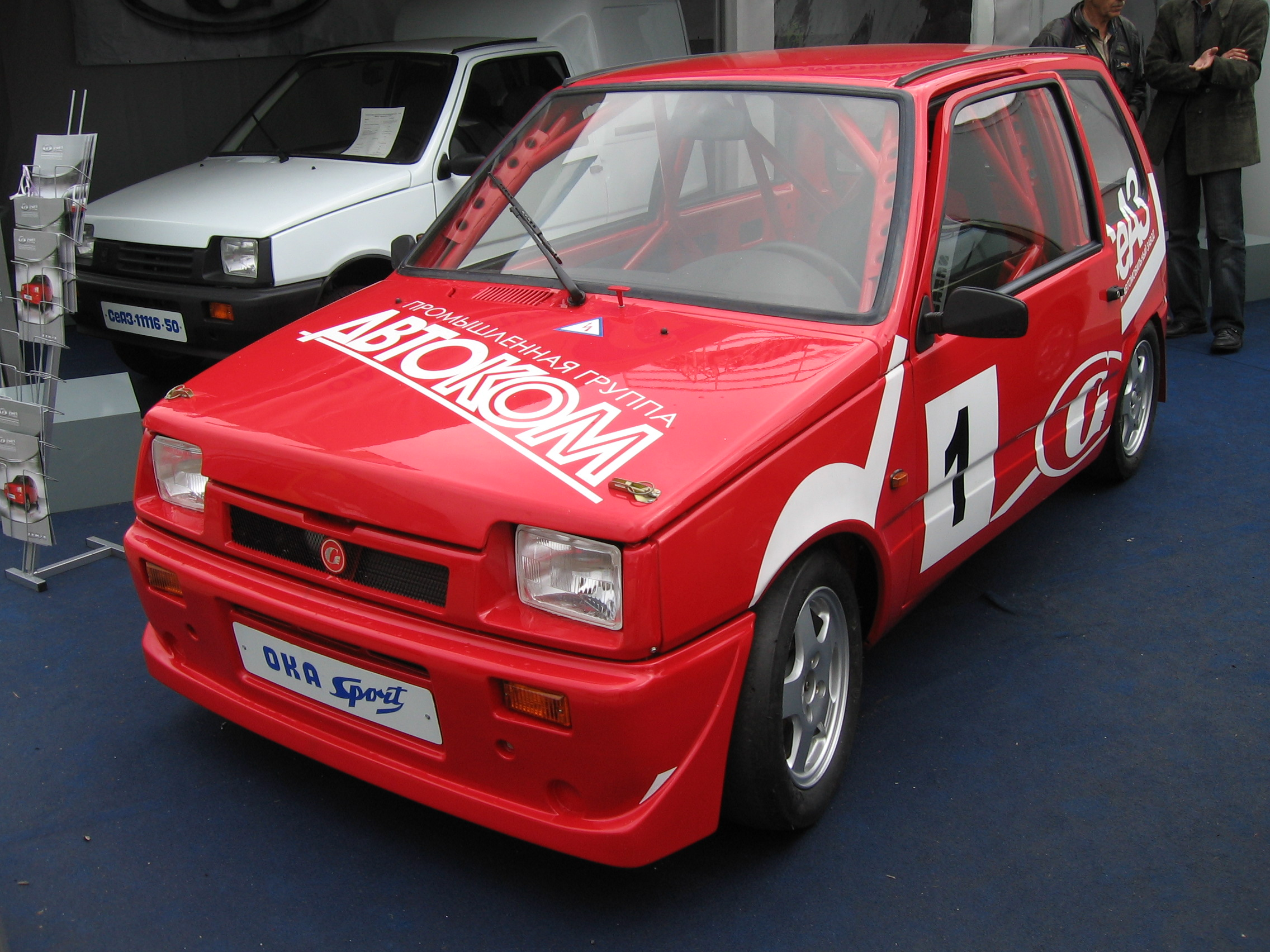 oka sport mims 2006